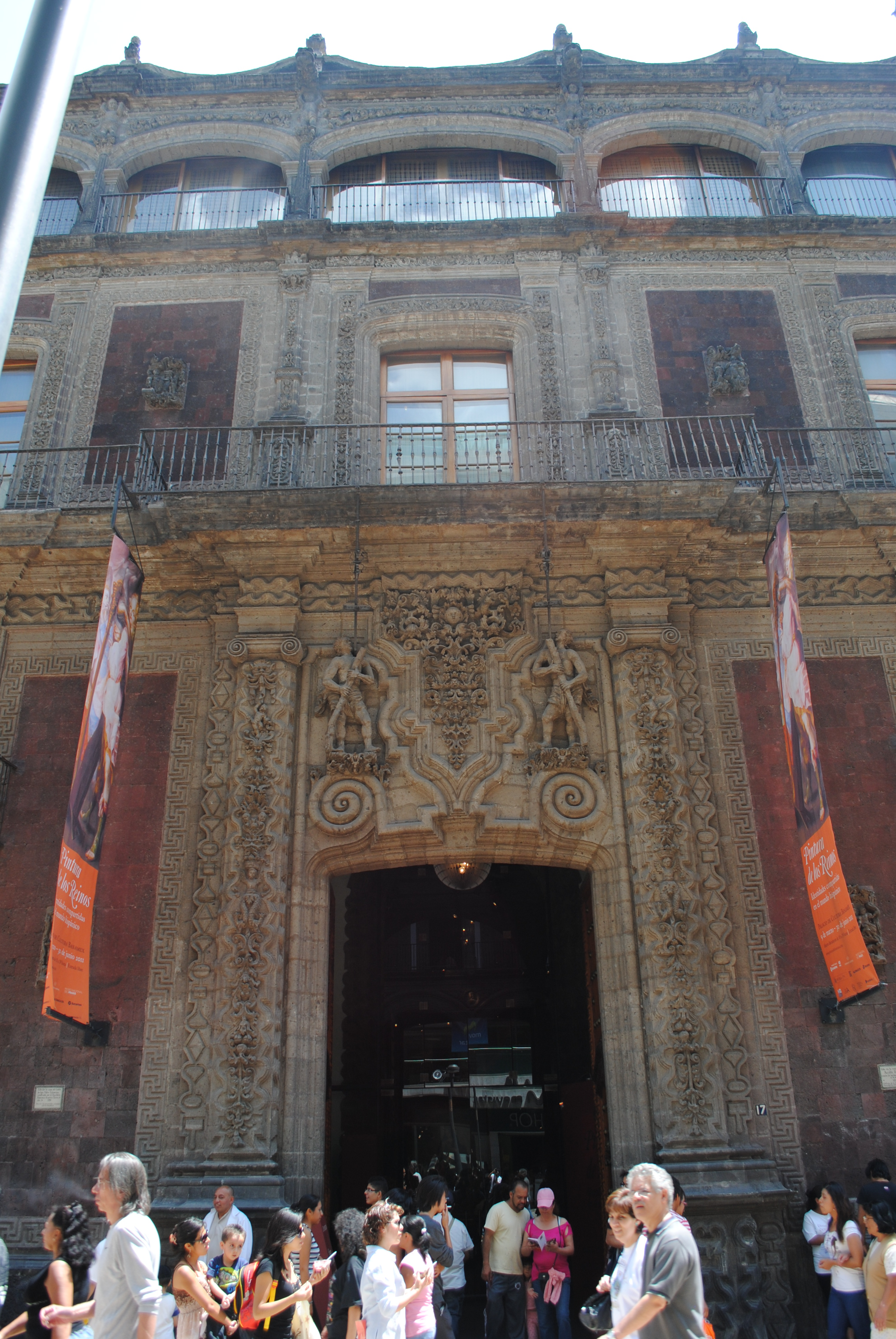 Palacio de los Condes de Valparaíso, también conocido como Palacio de Iturbide.